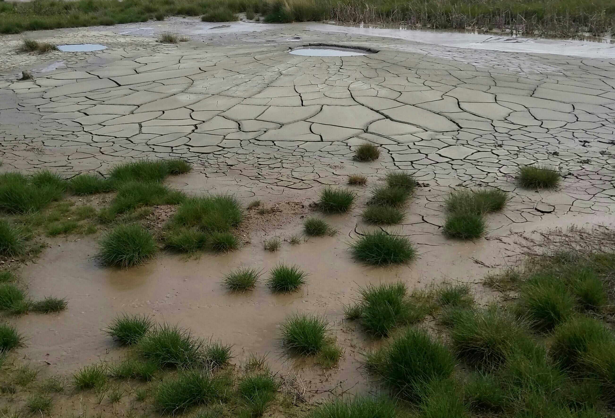 "Bolle della Malvizza" mud pots